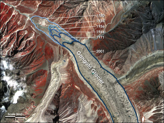 Rückgang des Gangotri-Gletschers